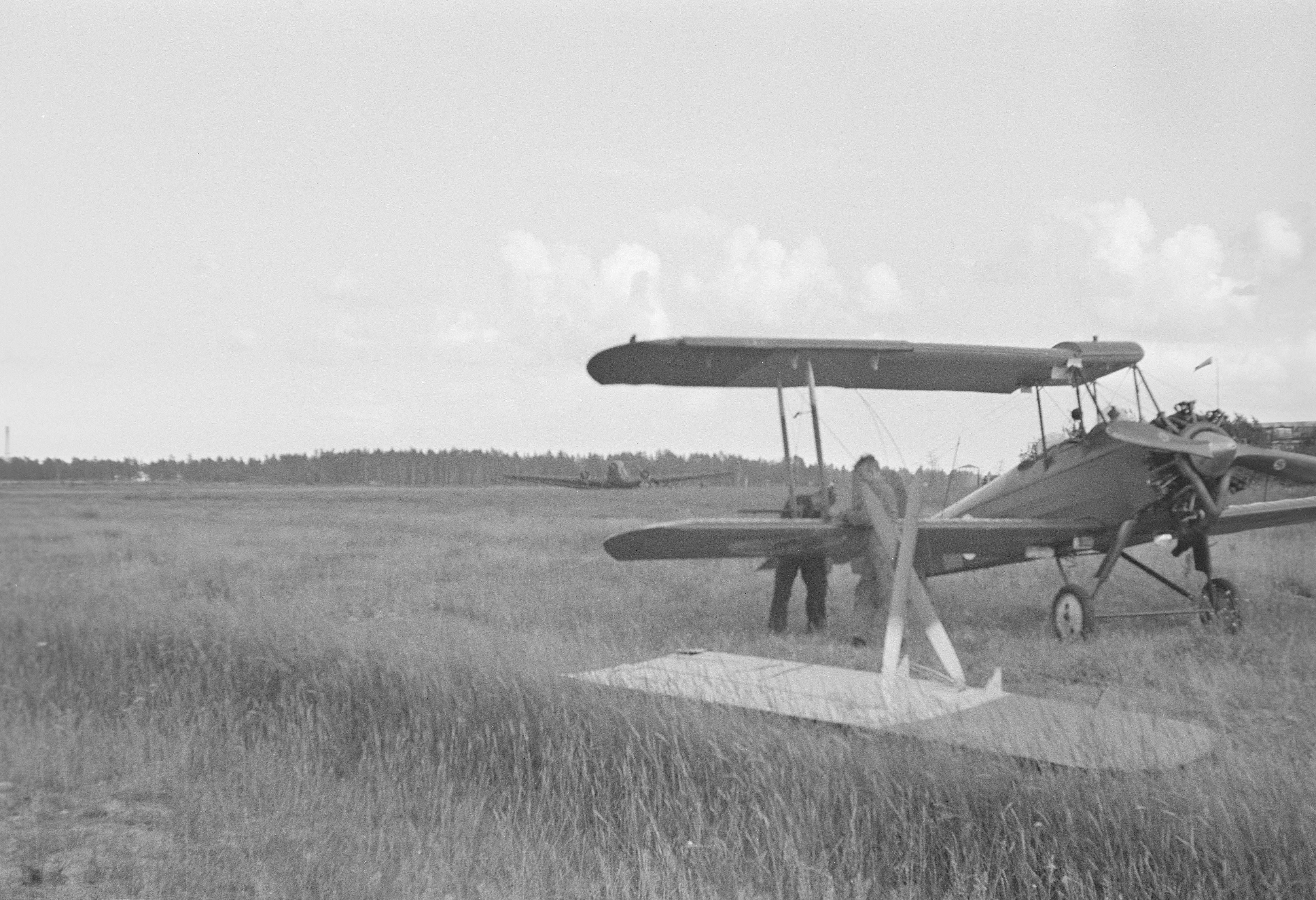 Käkisalmen Tenkalahden maastoon 10.7.1942 pakkolaskeutunut ""Sääski"" (SÄ-130) kuljetettiin autolla Käkisalmen lentokentälle, missä moottorin magneetot puhdistettiin, tasot kiinnitettiin uudelleen ja matka jatkui omin voimin Sakkolan kentälle. Taustalla ""Hannelore"". Käkisalmi 1942.07.11